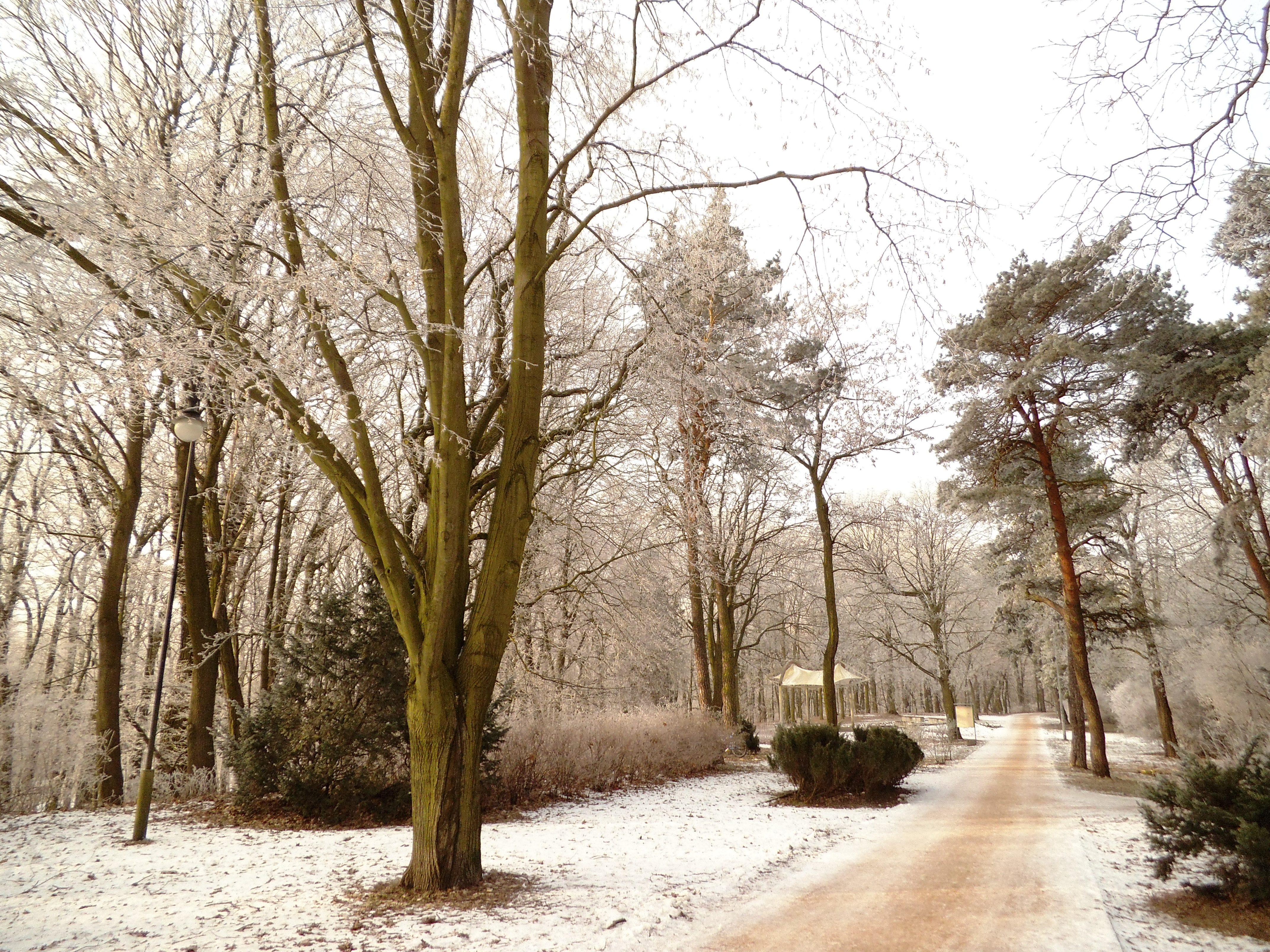 Park Miejski, zima 2016